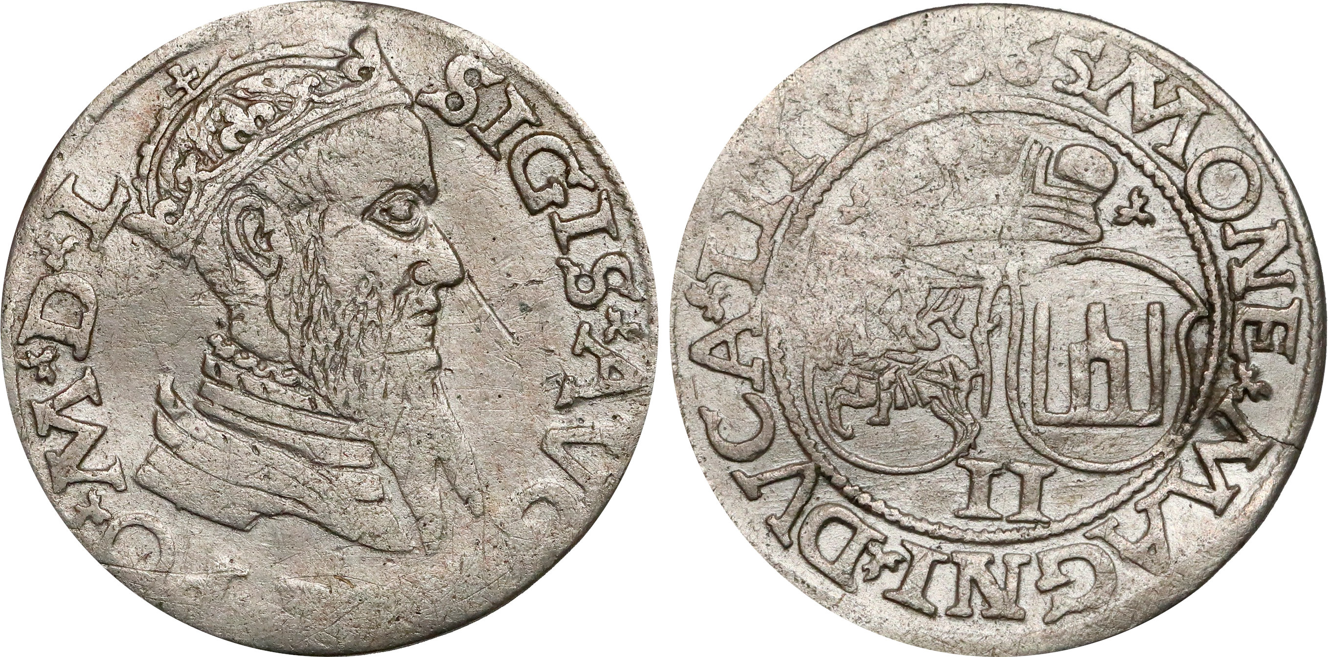 Dwugrosz 1565 Wilno